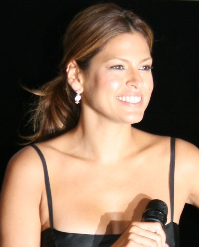 Eva Mendes à l'avant-première de Live ! diffusée à l'UGC Ciné Cité Les Halles, à Paris.